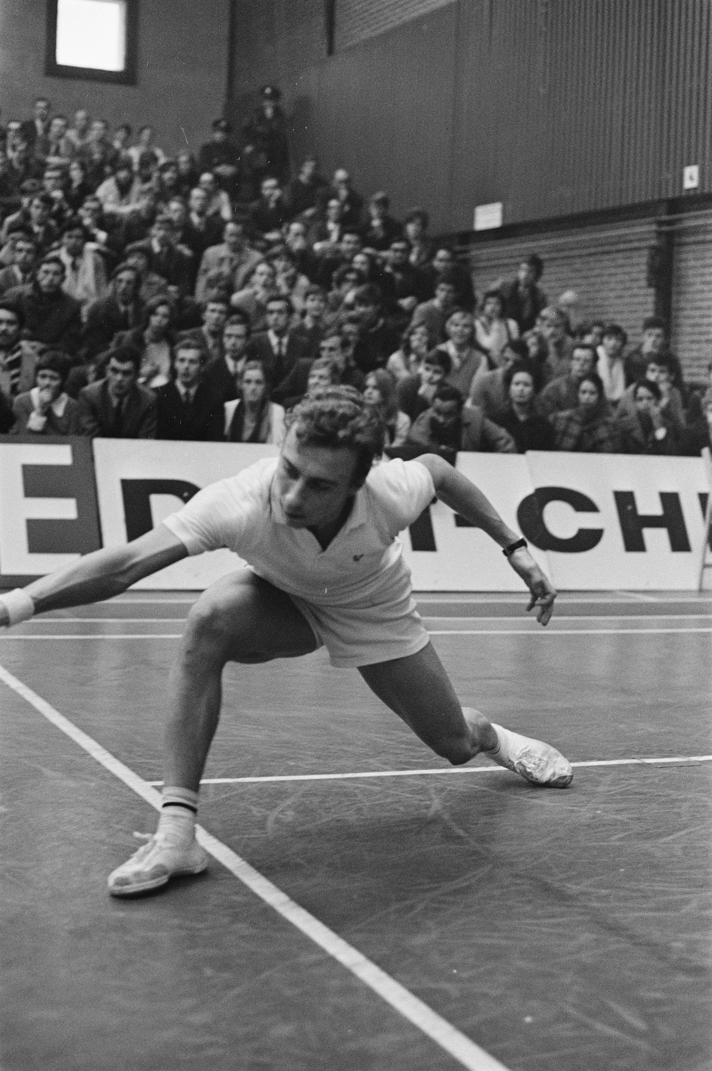 Collectie / Archief : Fotocollectie Anefo Reportage / Serie : [ onbekend ] Beschrijving : Internationale badmintonwedstrijden in Duinwijckhal Haarlem Spelmoment Datum : 15 februari 1970 Locatie : Haarlem Trefwoorden : badminton Persoonsnaam : Duinwijckhal Fotograaf : Verhoeff, Bert / Anefo Auteursrechthebbende : Nationaal Archief Materiaalsoort : Negatief (zwart/wit) Nummer archiefinventaris : bekijk toegang 2.24.01.05 Bestanddeelnummer : 923-2562